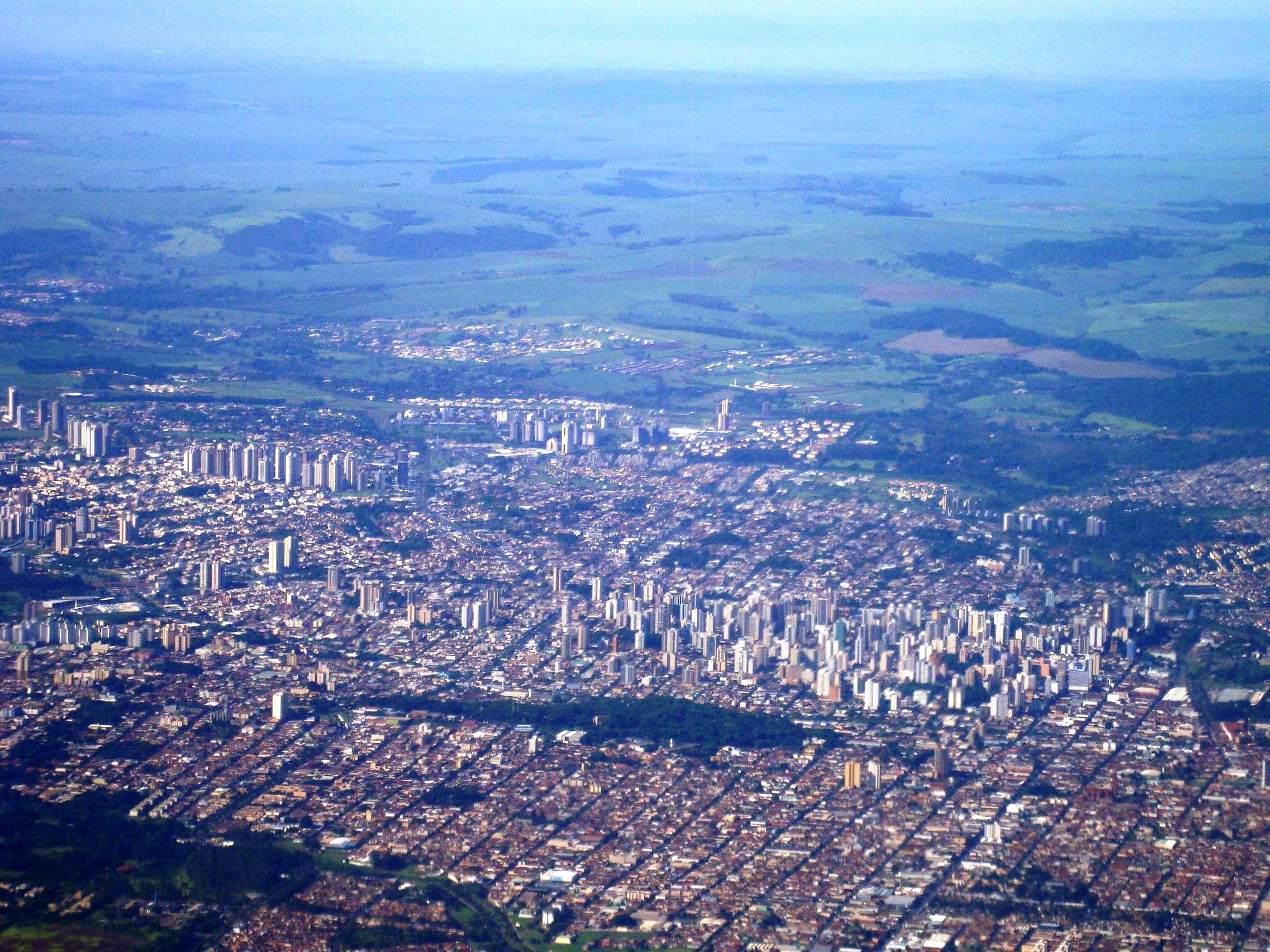 Vista aérea de Ribeirão Preto-SP (2010)